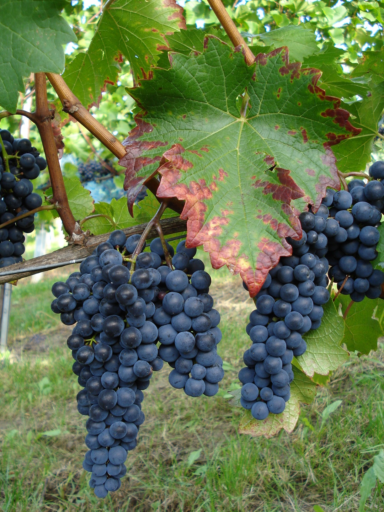 Traube und Blatt der Rotweinsorte Cabernet Jura